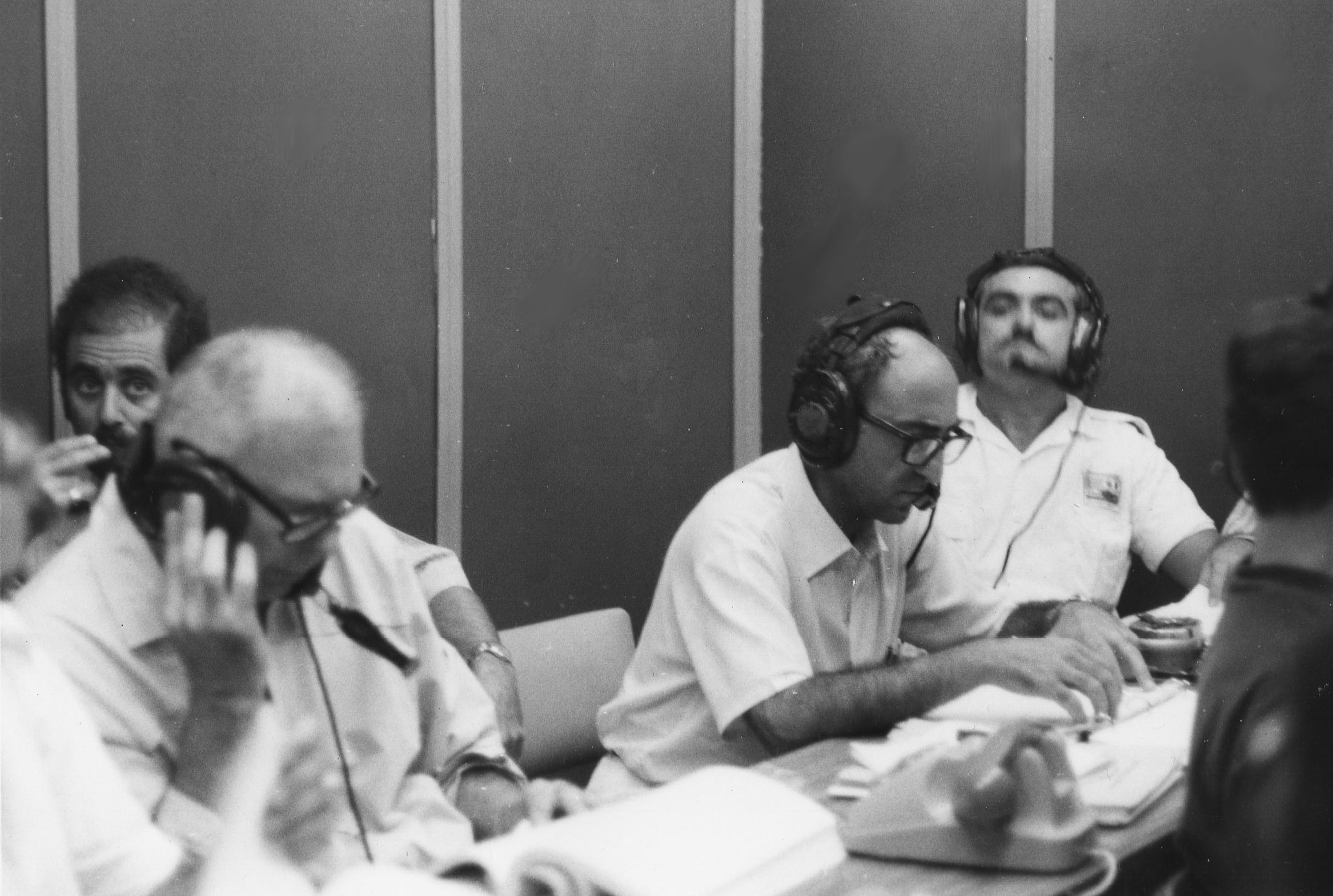 L'ingegnere Sirinian al lavoro sul progetto